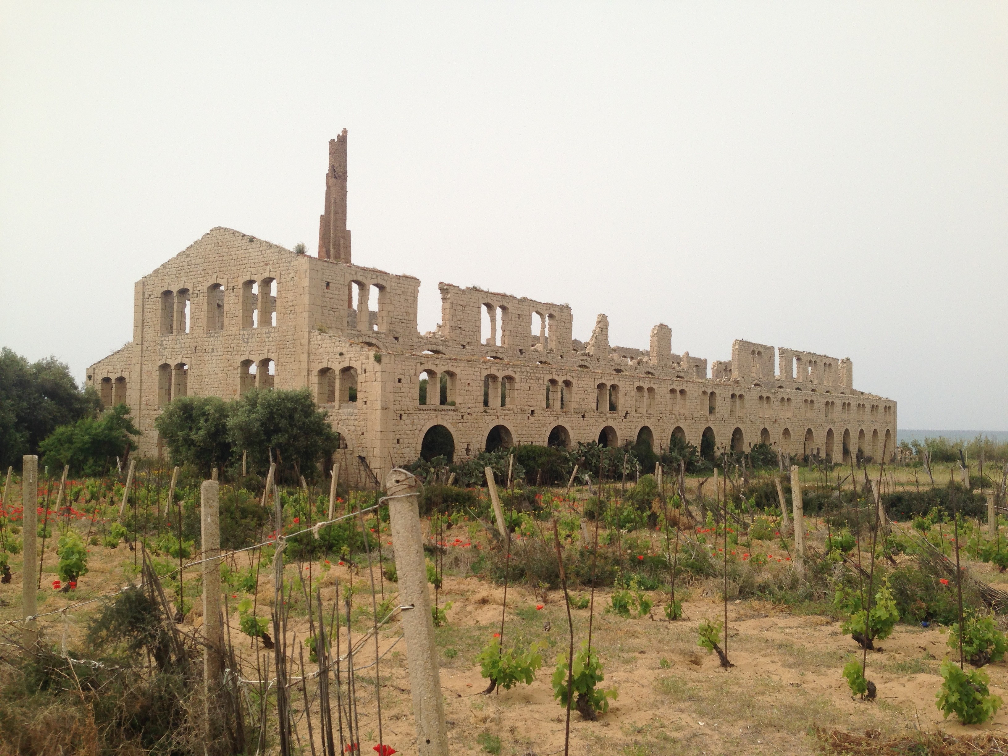 vista dal lato